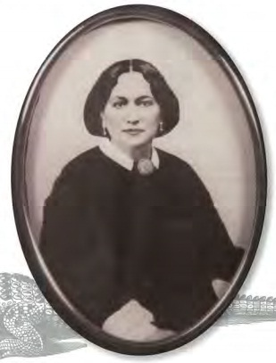 Dedinszky Eleonóra (1816-1868), Haraszthy Ágoston felesége